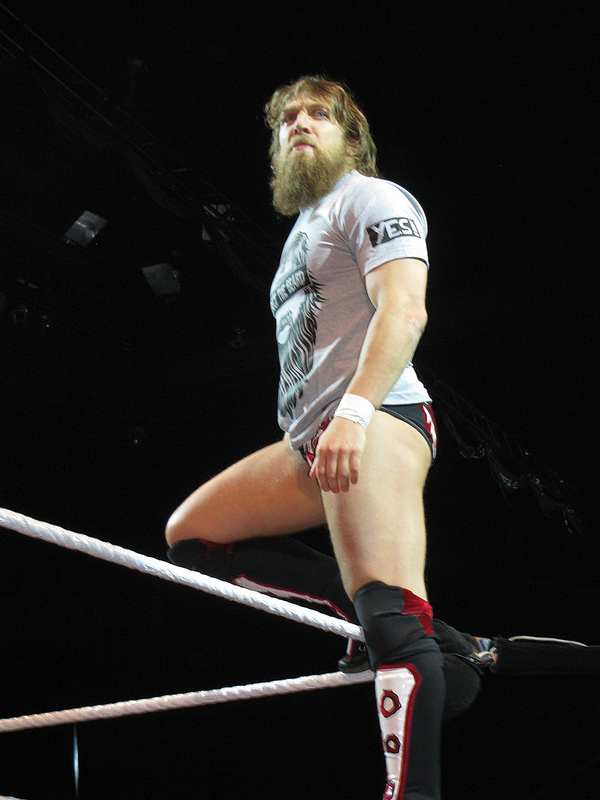 Daniel Bryan 2013.